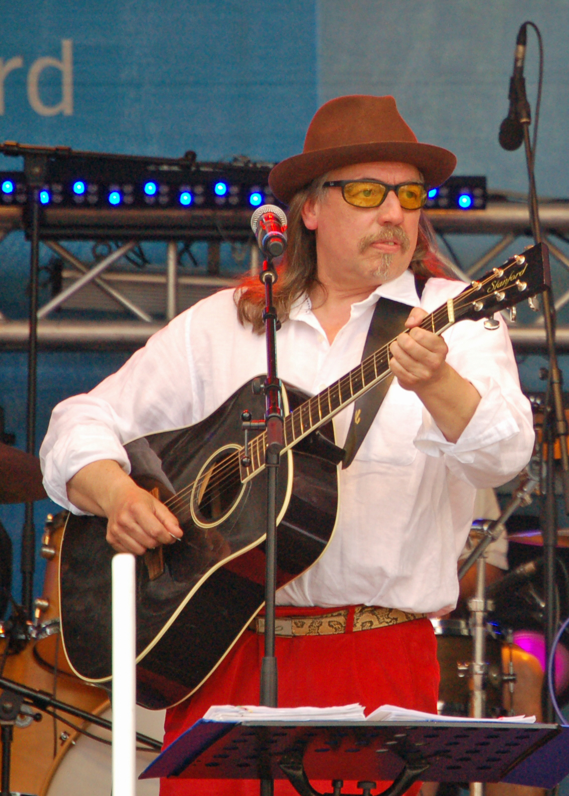 Charly (Rainer) Beutin von der Charly Beutin & die Schreckschuss Band während des Schleswig-Holstein-Tag 2010 in Rendsburg